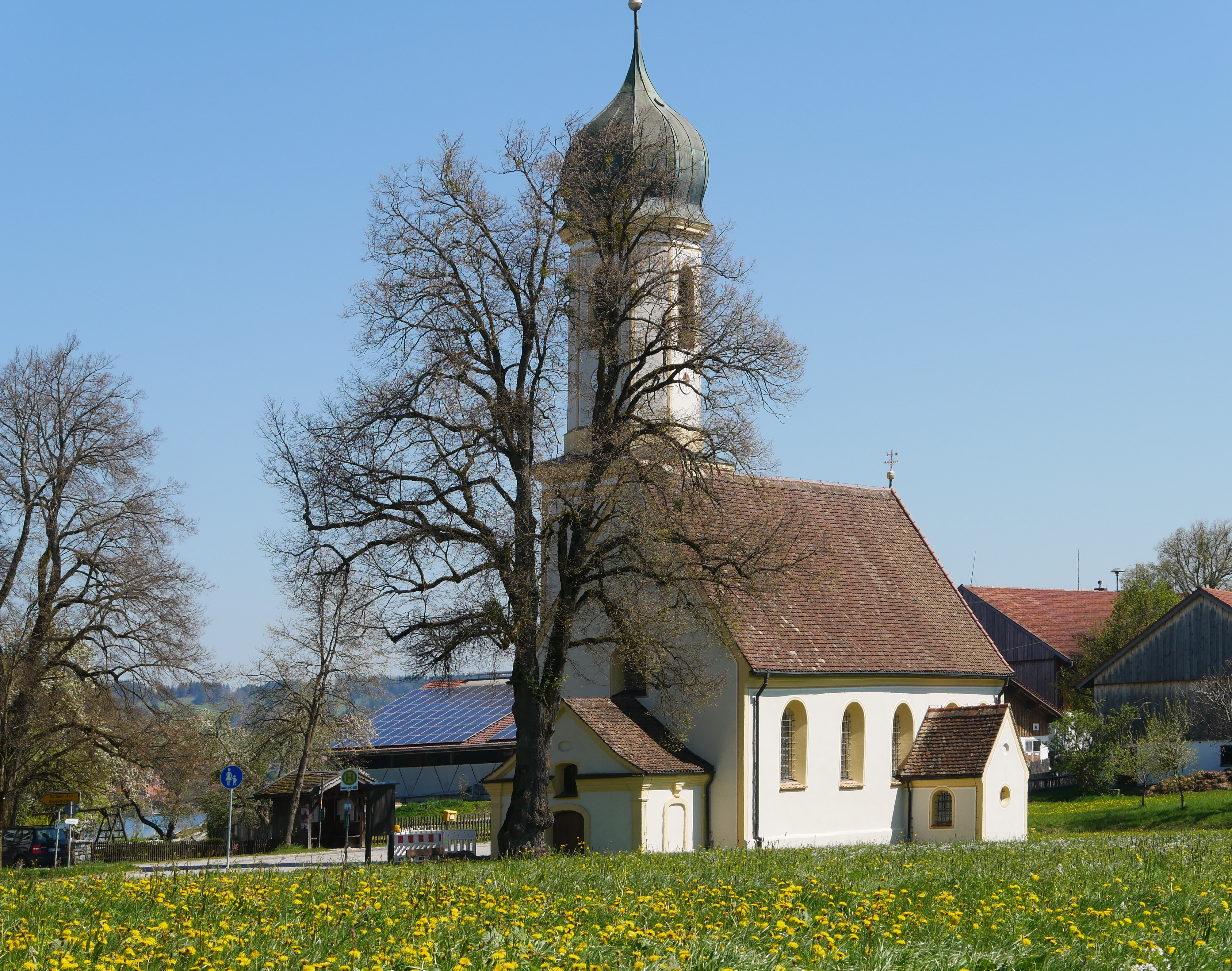 Murnau-Froschhausen, Riegseer Str.4, Kath. Filialkirche St. Leonhard: Ansicht von SW. Alljährliche Leonhardifahrt (Prozession mit festlich geschmückten Pferden aus der ganzen Umgebung unter Beteiligung von Trachtenvereinen und Musikkapellen) von Murnau nach Froschhausen am Patronatstag des Hl. Leonhard (6. November), abschließend Segnung der Pferde in der Kirche St. Leonhard